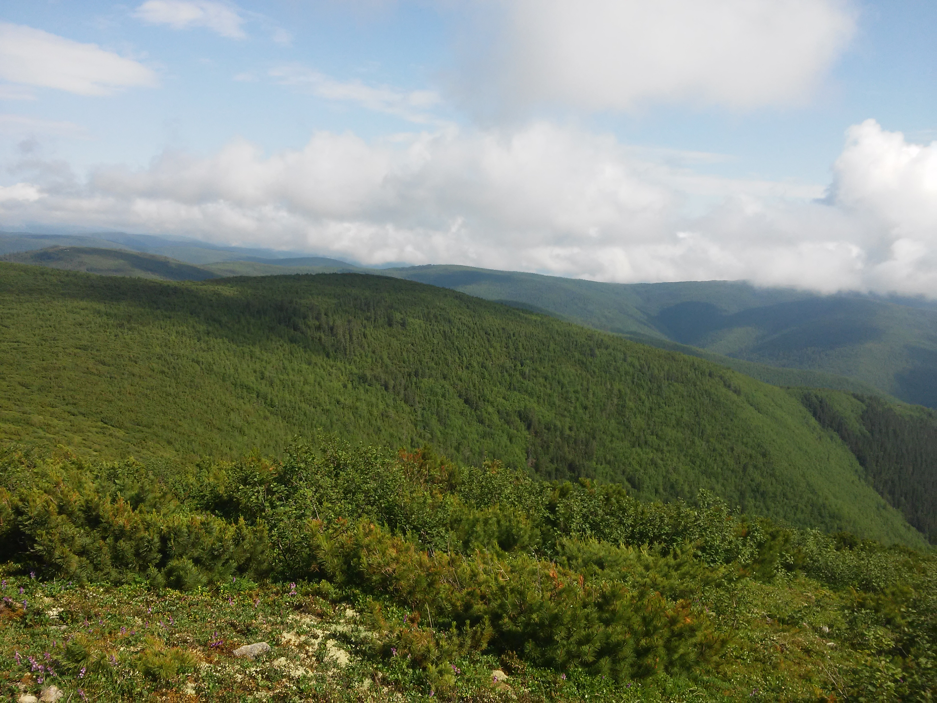 Высота - 1100 метров